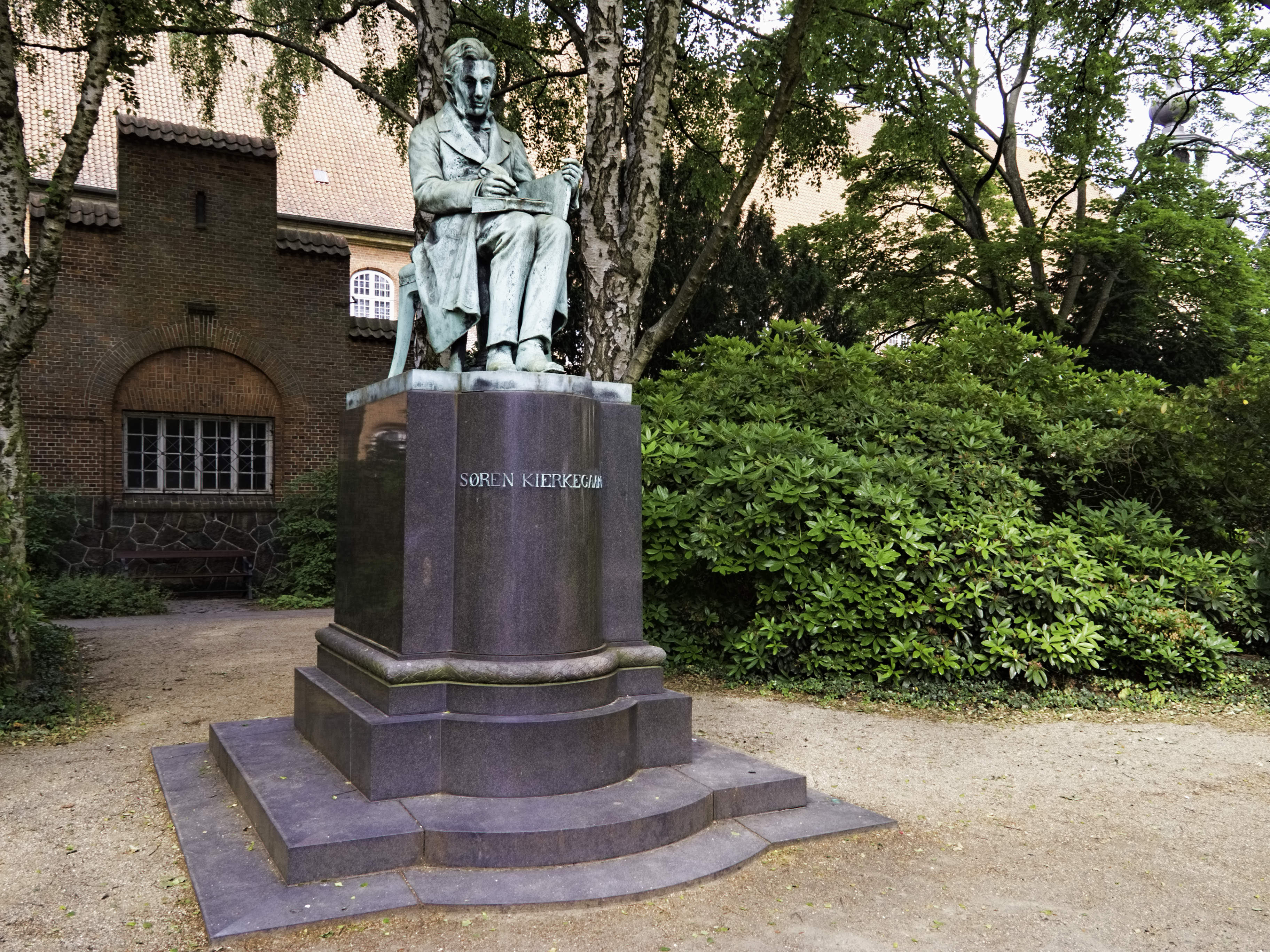 Statue of Søren Kierkegaard in Copenhagen, Denmark